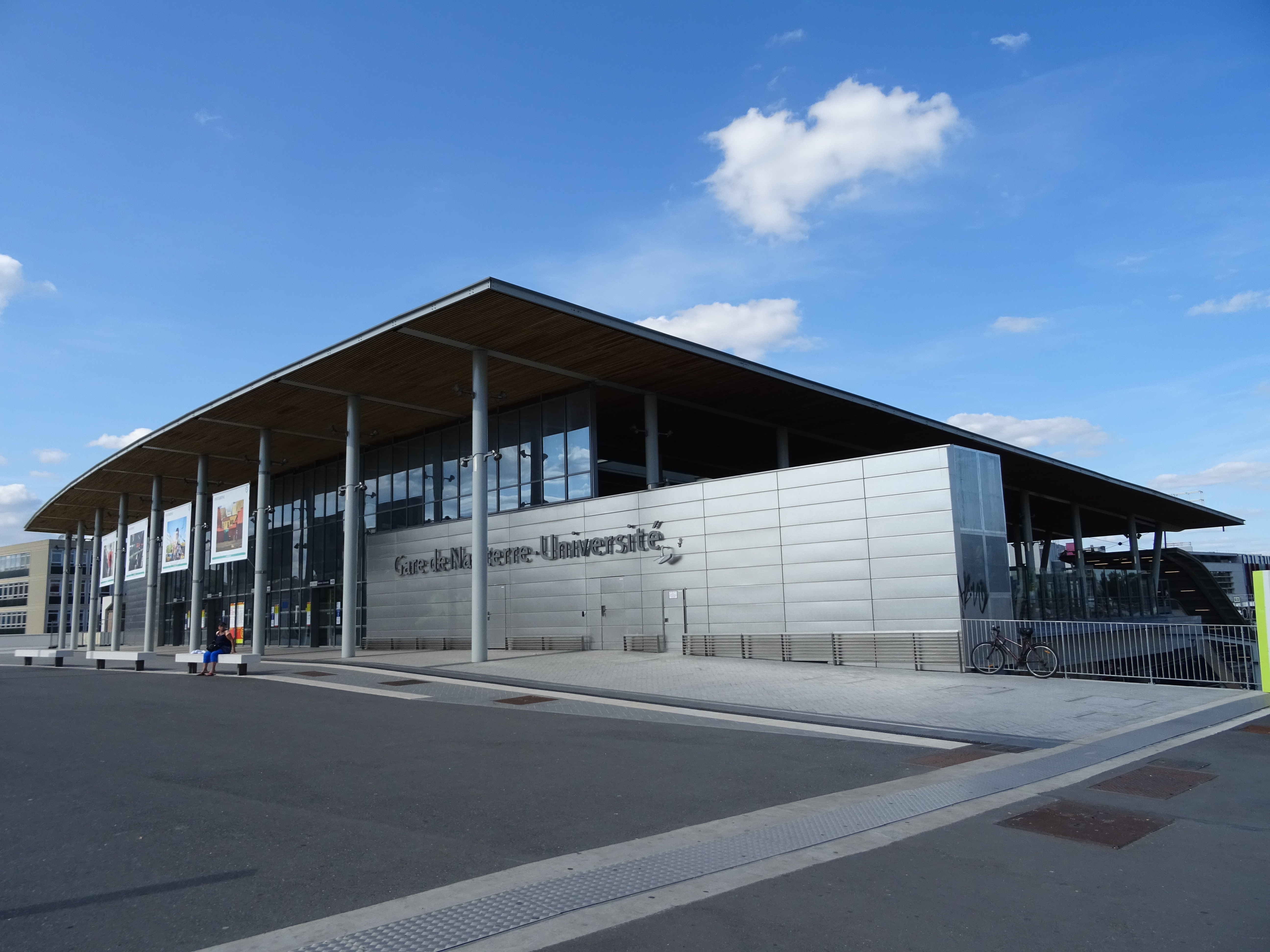 Bâtiment voyageurs de la gare de Nanterre-Université